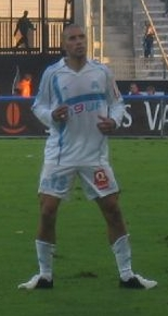 Christian Gimenez sous les couleurs de l'Olympique de Marseille lors du match OM-Lille du 29 octobre 2005